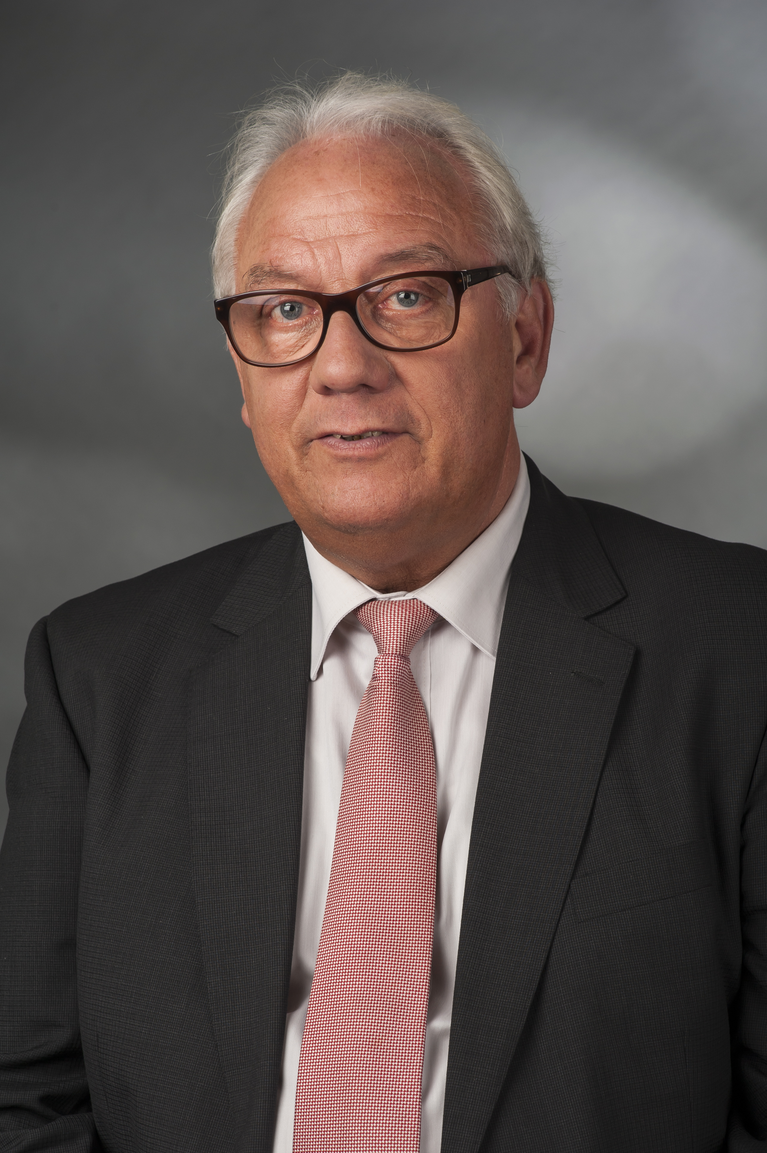 Helmut Brandt (* 24. Oktober 1950) ist ein deutscher Politiker (CDU) und Justiziar der CDU/CSU-Bundestagsfraktion.